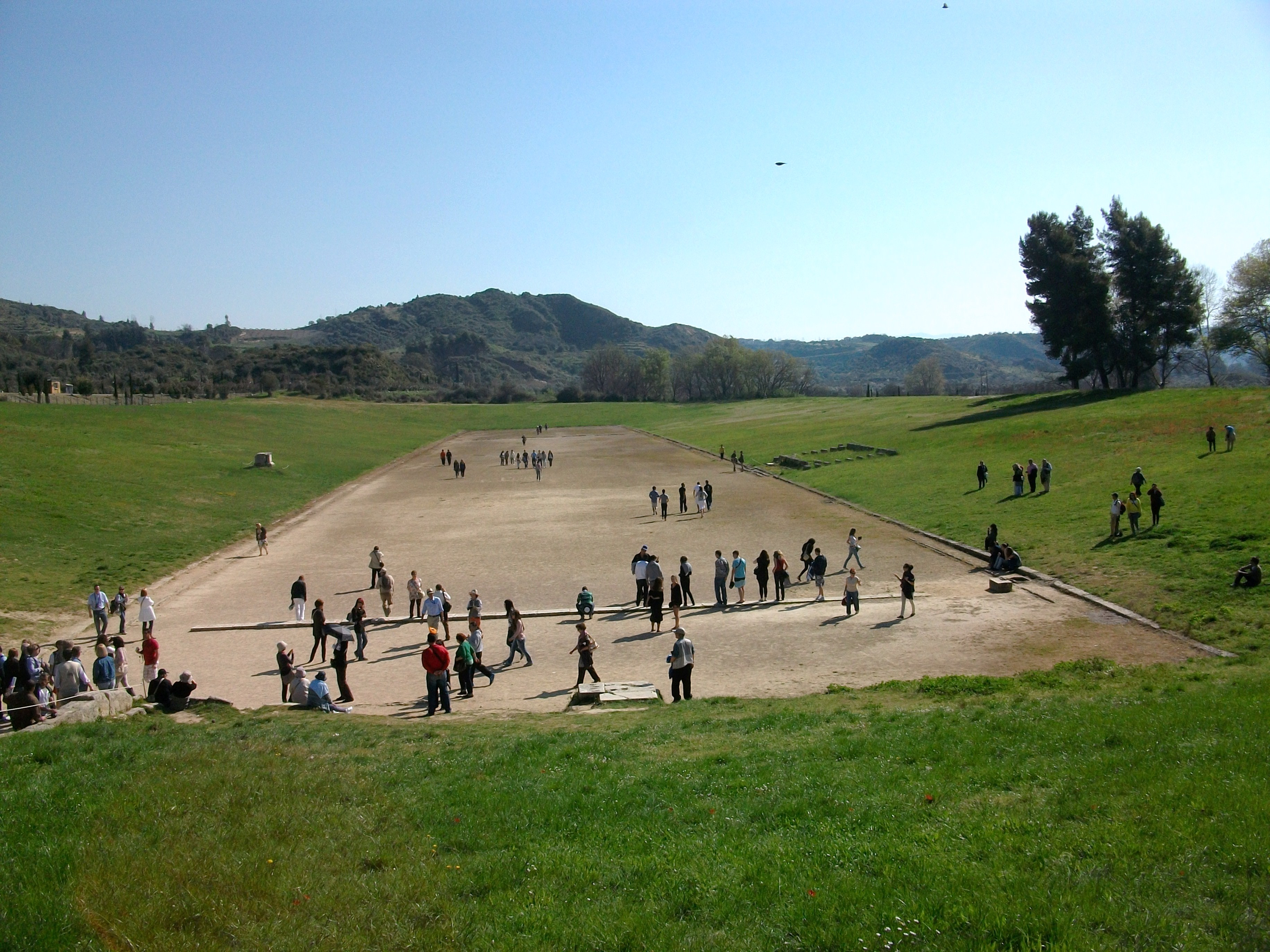 Estadi on se celebraven els Jocs Olímpics, Olímpia.